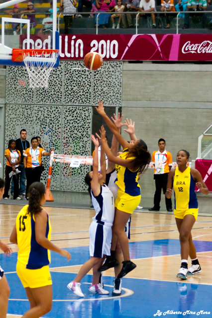 Partido de baloncesto femenino entre los seleccionados de Brasil y Ecuador en el marco de los IX Juegos Suramericanos Medellin 2010.